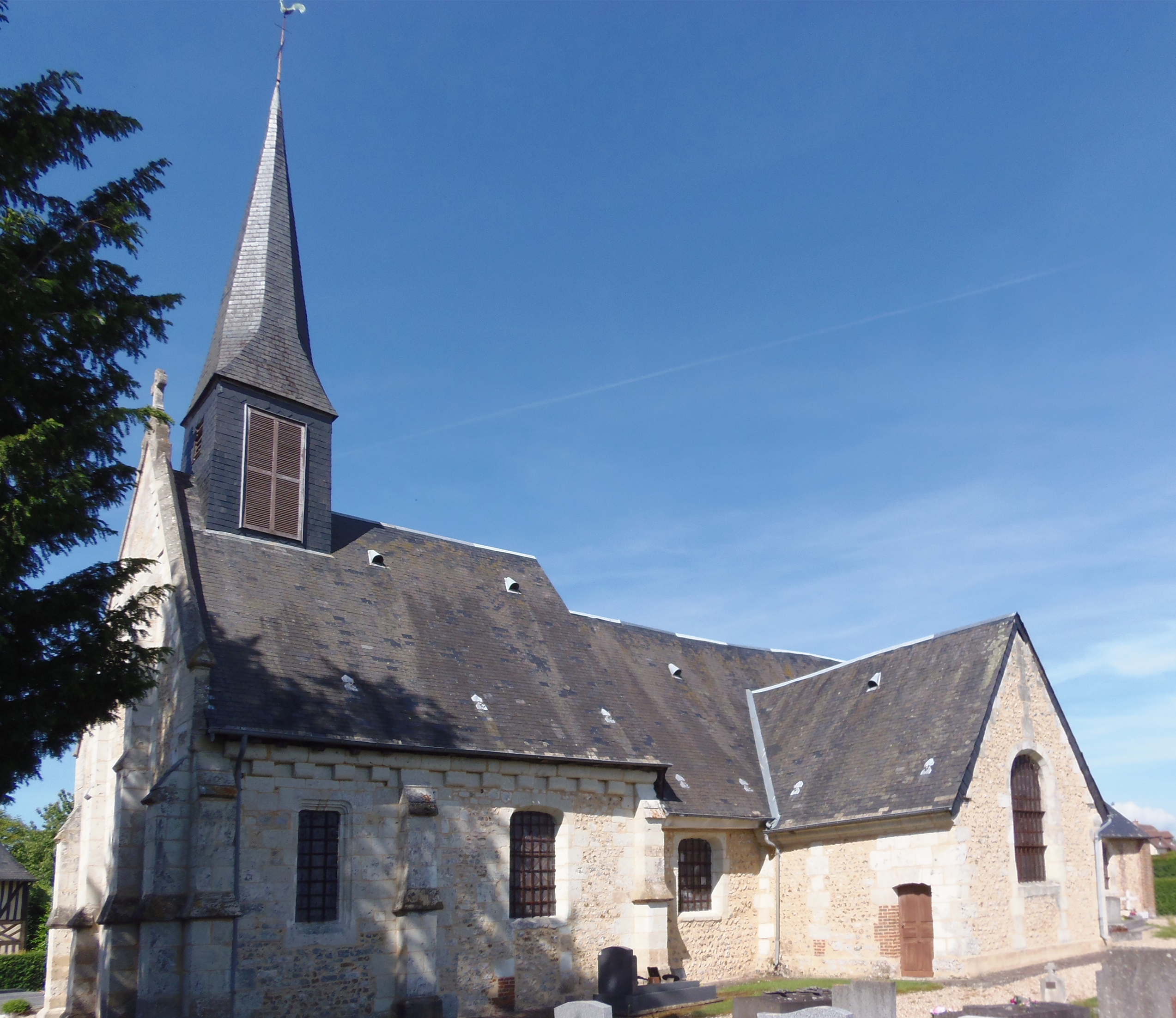 Le Torquesne (Normandie, France). L'église Notre-Dame.